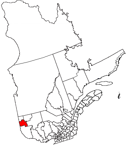 Volapük: Topam in provin: Québec.